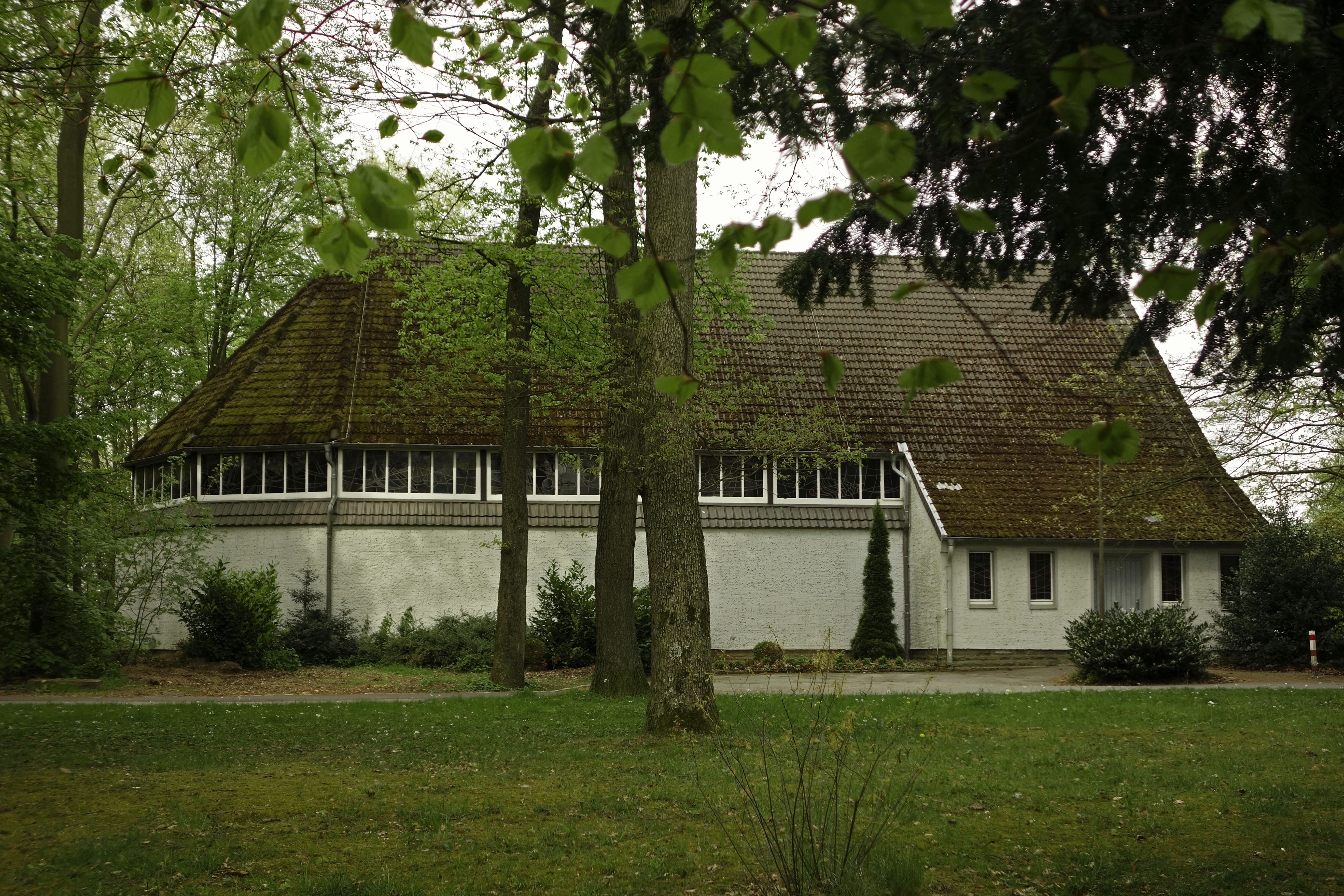 Die Johanneskirche liegt im Süden des Wuppertaler Stadtbezirks Elberfeld am Rande des von-der-Heydt-Parks, in der Nähe des Friedenshains. Als eine der 43 Notkirchen des Architekten Otto Bartning (1883–1959) wurde die Johanneskirche 1948/1949 nach dem Notkirchenprogramm des Evangelischen Hilfswerks für die von schweren Kriegsschäden betroffene Evangelisch-lutherische Gemeinde Elberfeld erbaut. Finanziert wurde der Bau hauptsächlich durch Spenden der amerikanischen Sektion des Lutherischen Weltbundes. Die Johanneskirche wurde am 17. April 1949 als erster Kirchenneubau Wuppertals nach dem Zweiten Weltkrieg eingeweiht. Signifikantes Merkmal ihrer reduktionistischen Architektur ist die (von außen nicht sichtbare) zeltartige Dreigelenkbinderkonstruktion aus Holz und ein vorwiegend aus Trümmersteinen errichtetes, außen verputztes Mauerwerk. Der Grundriss entspricht dem Typ B des Notkirchenprogramms mit 5/10-Chorschluss. Die Bedeutung Bartnings liegt unbestritten in seinem Beitrag zur Entwicklung des modernen protestantischen Kirchenbaus. Bartning sah den Kirchenbau als klar umrissene Bauaufgabe an und hat sich sowohl mit dessen räumlicher Gestaltung als auch mit der Problematik von Technik und Materialien theoretisch und praktisch auseinandergesetzt. Erhaltung und Nutzung liegen daher gemäß § 2 (1) DSchG aus städtebaulichen, wissenschaftlichen und stadthistorischen Gründen im öffentlichen Interesse. Die Unterschutzstellung erstreckt sich auf das gesamte Gebäude.This is a photograph of an architectural monument.